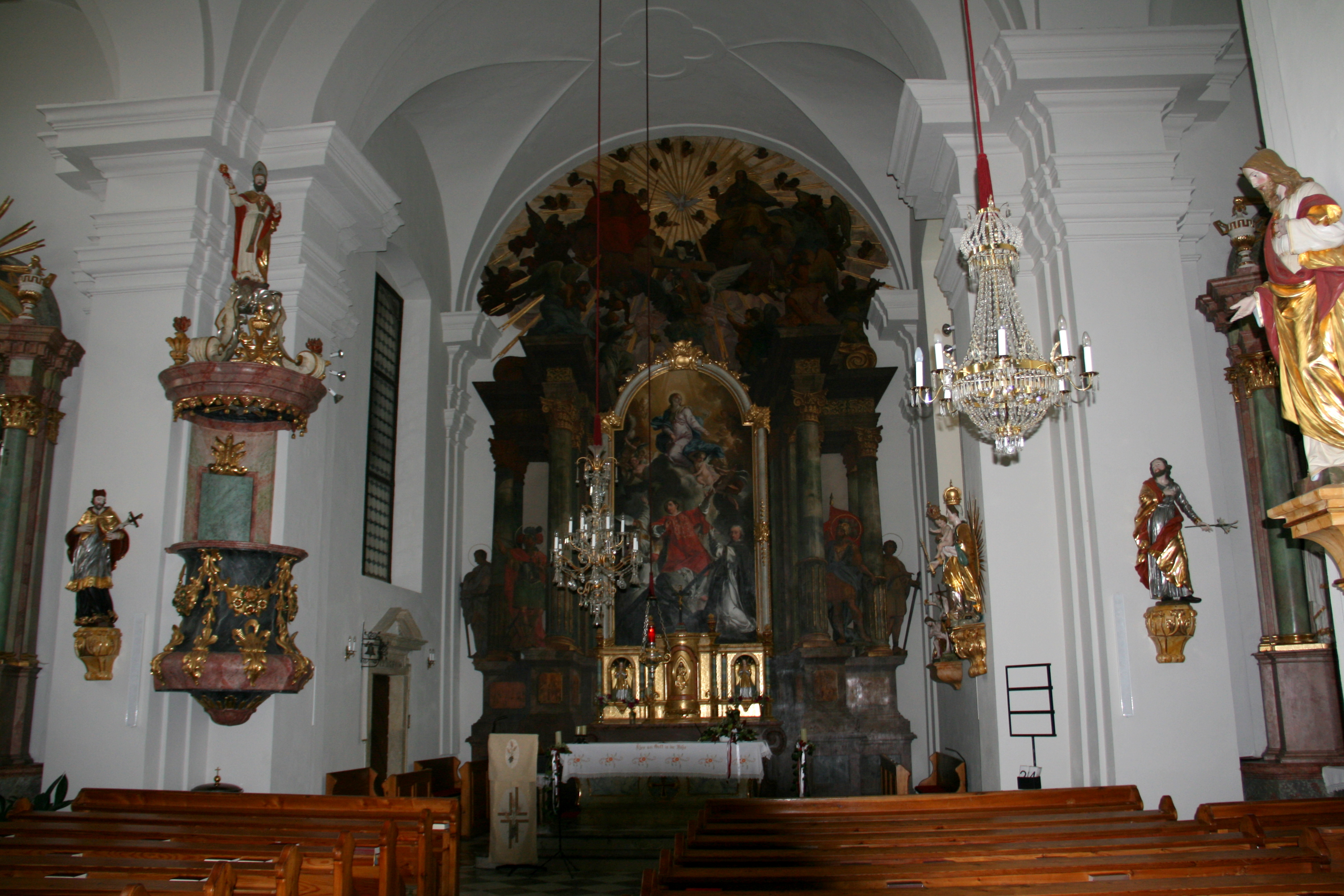 Kath. Pfarrkirche hl. Laurentius, Innenansicht